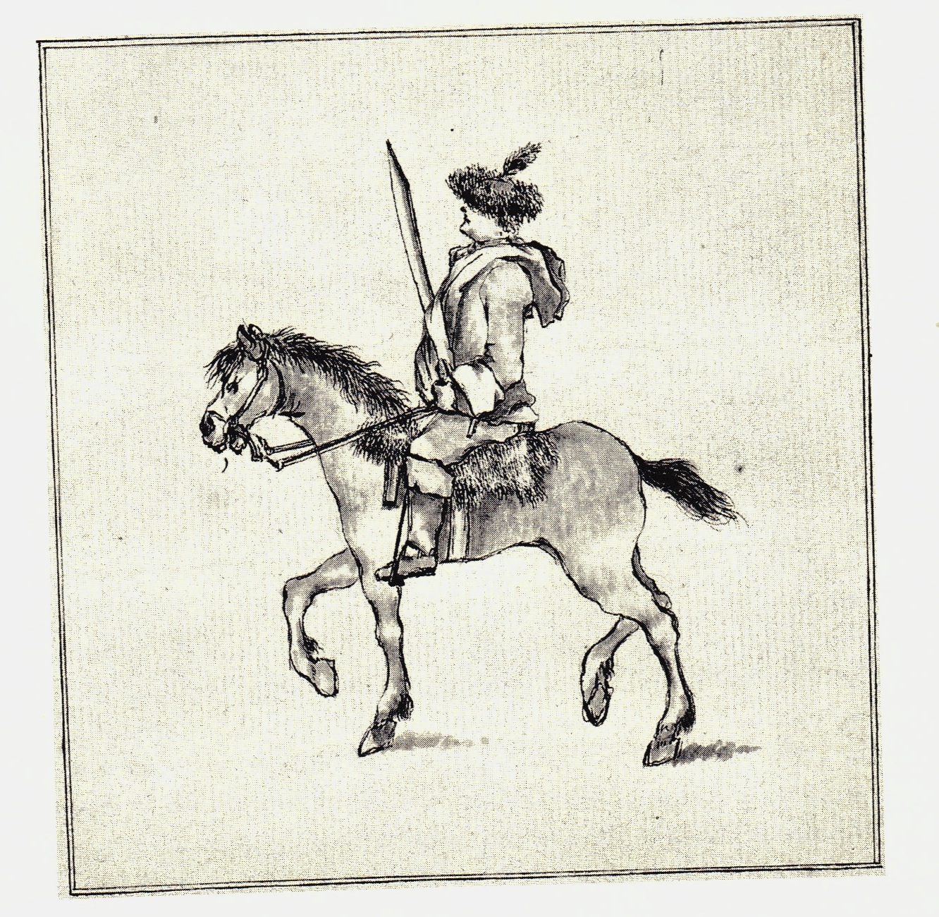 Набросок, сделанный неизвестным автором во время якобитского восстания 1745 года в Шотландии, в г. Пеникуик.